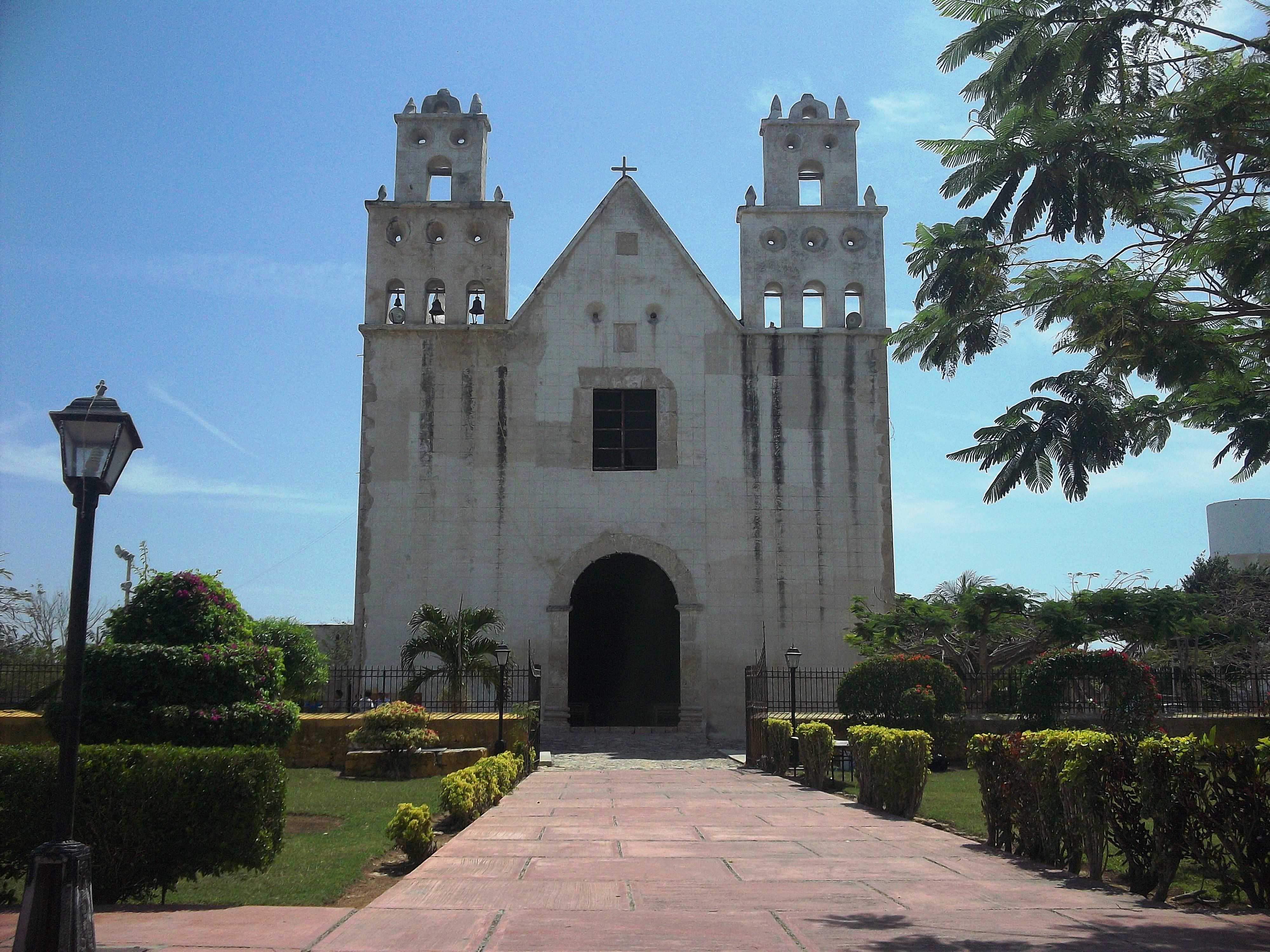 Iglesia de Ixil, Yucatán.